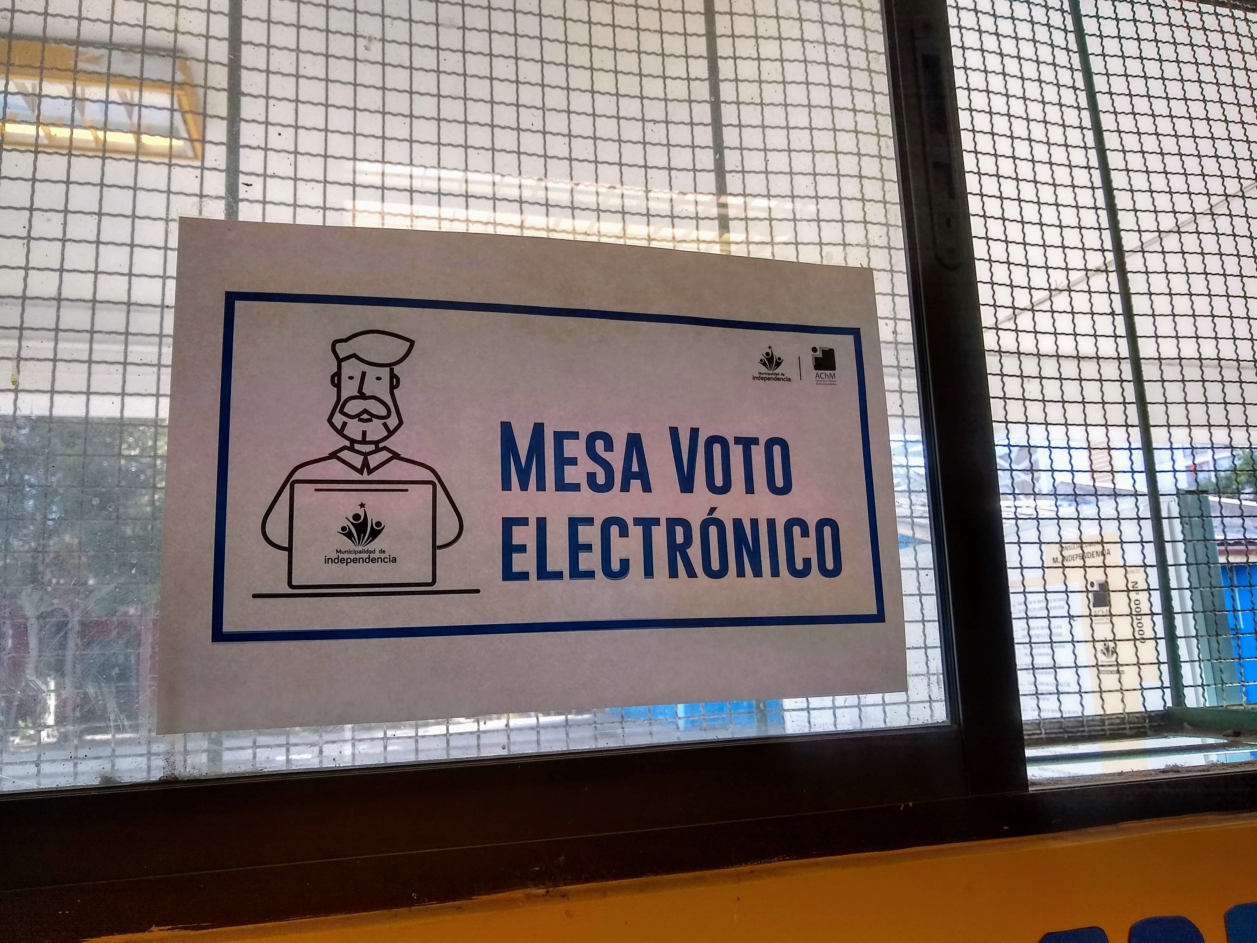 Cartel que anuncia el voto electrónico en un local de votación en Independencia